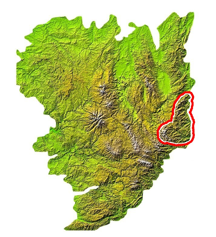 Situation des monts du vivarais sur la carte du Massif central